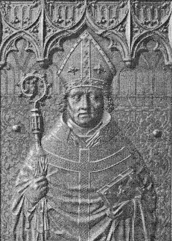 Epitaph für Bischof Johann IV. Roth im Breslauer Dom.